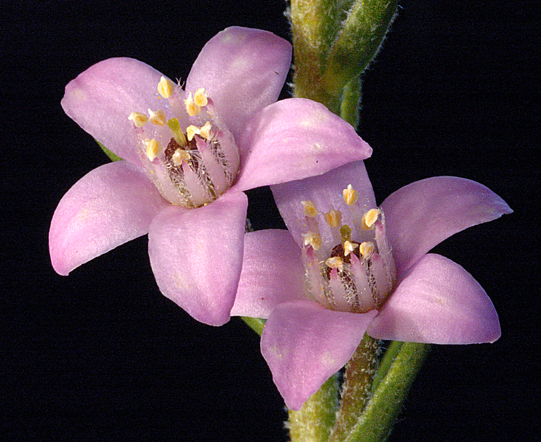 KRT3044